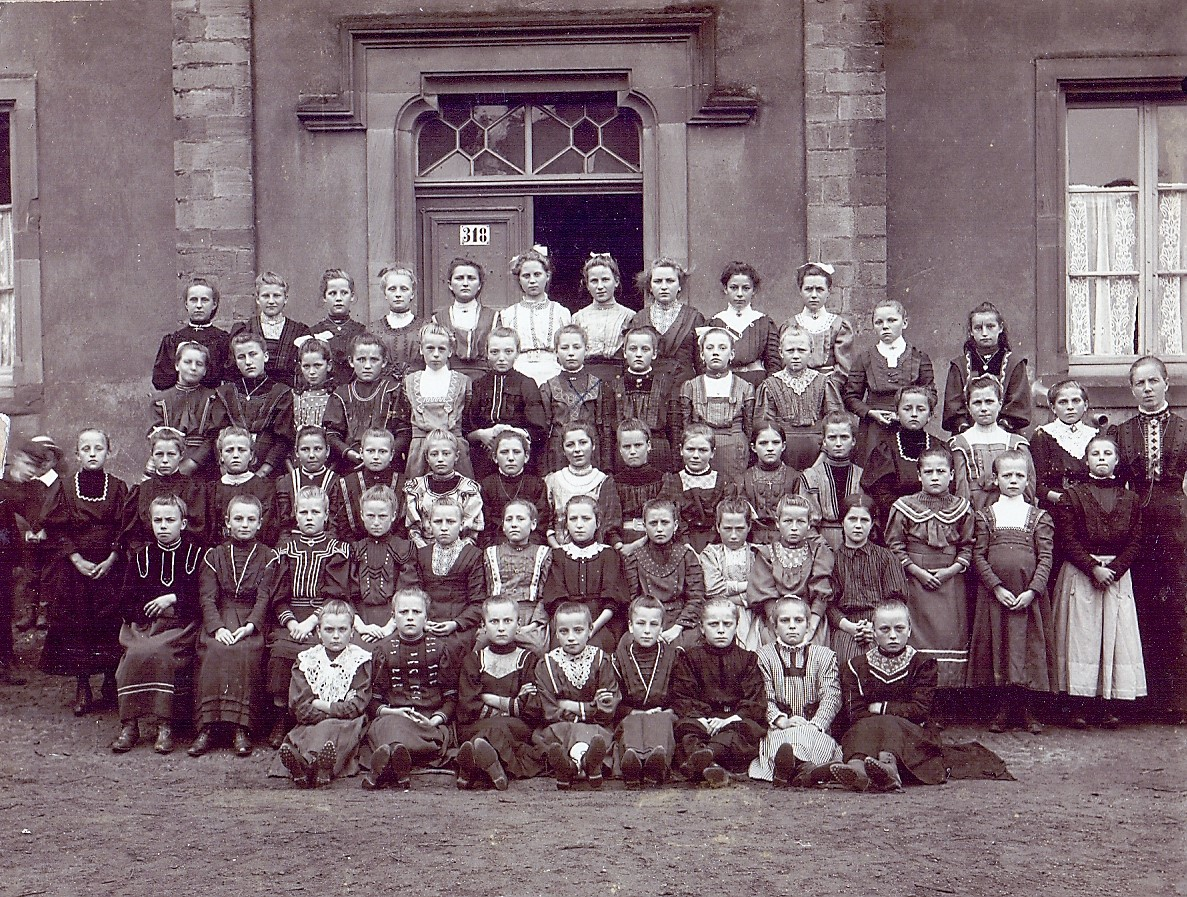 Diefflen, Mädchenschulklasse um 1900